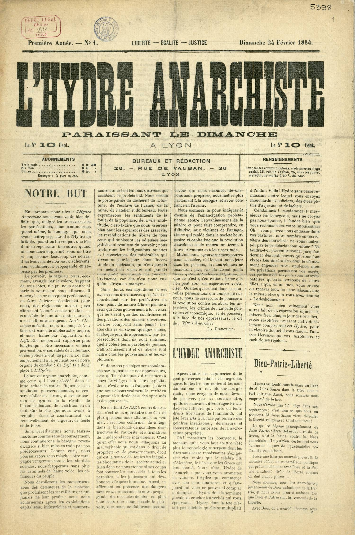 L’Hydre Anarchiste : numéros publiés entre février et mars 1884.